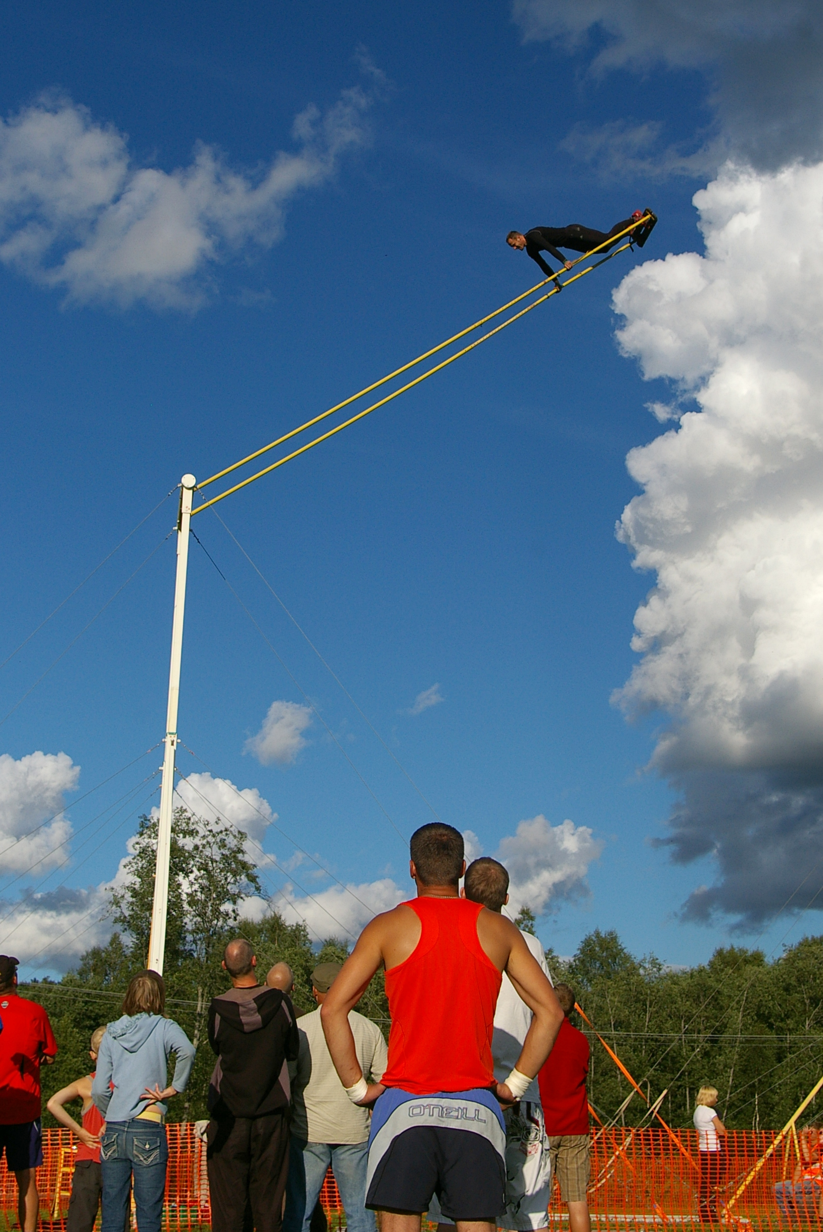 Kiiking